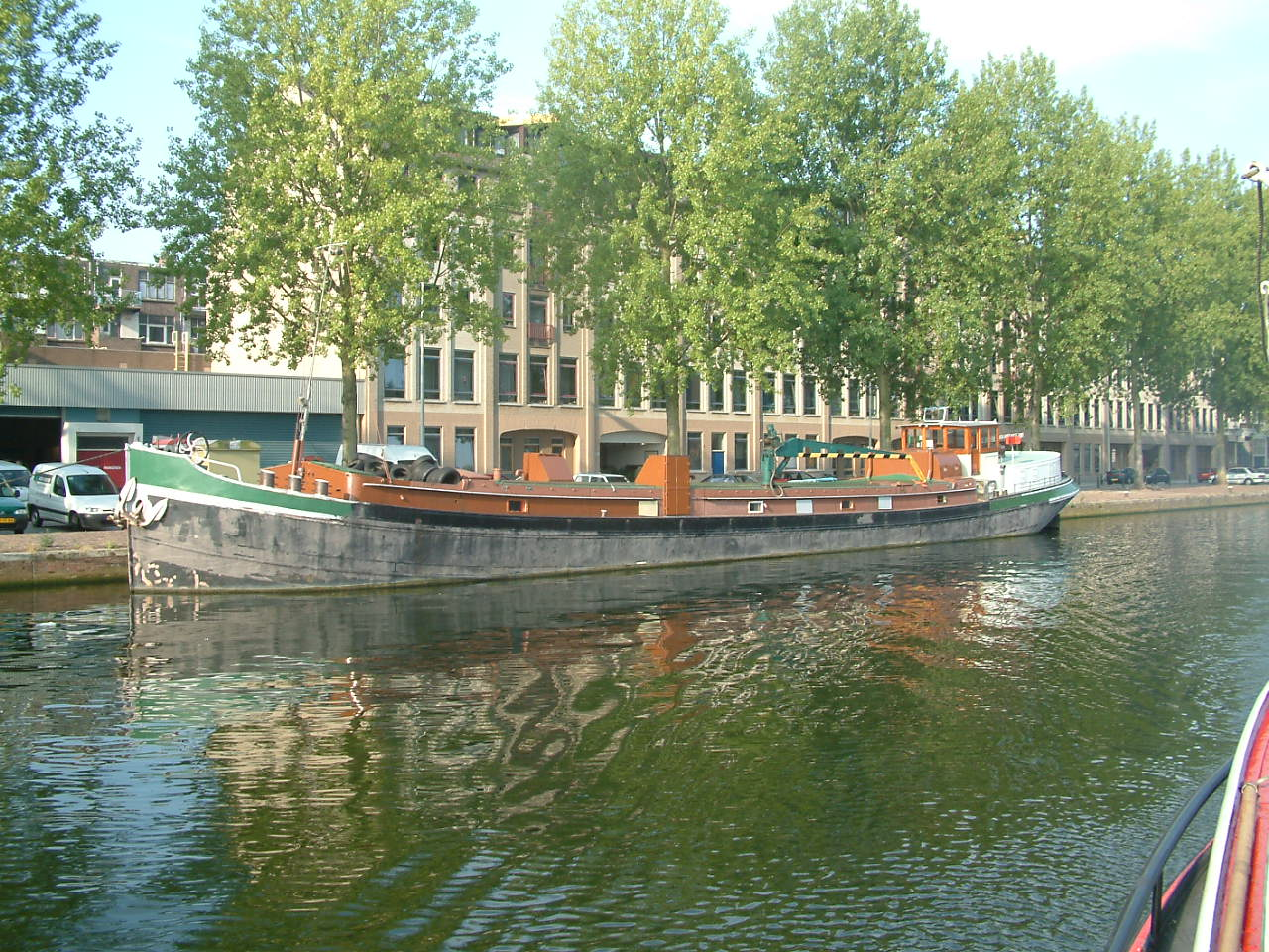 m.s. De tijd zal 't leren van de Lischgroep Rotterdam